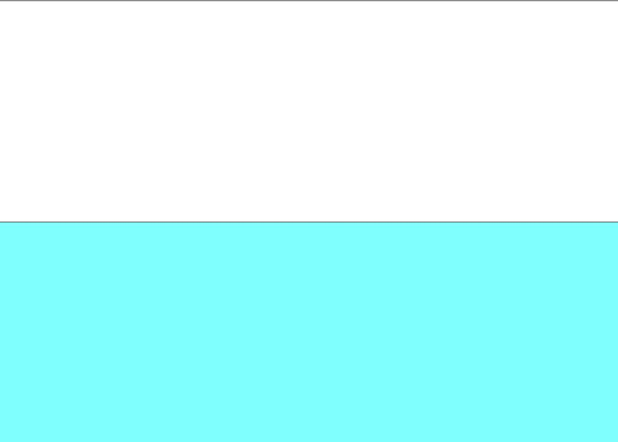 esta es la bandera de nuestro corregimiento